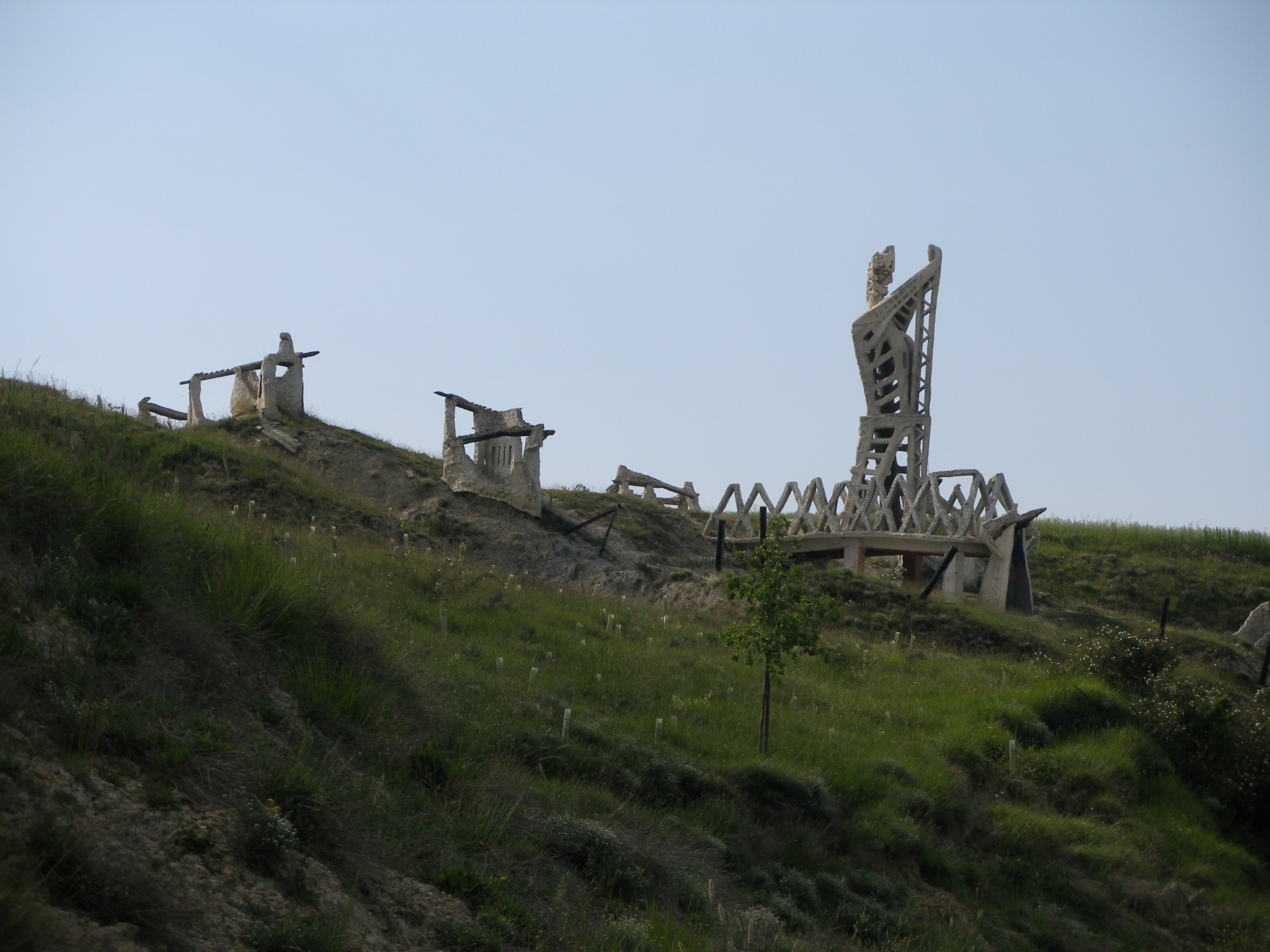 Monumento de la batalla de Noáin en Salinas de Pamplona o Getze, Galar.Noaingo guduaren monumentua Getzen, Galar, Nafarroa, Euskal Herria.